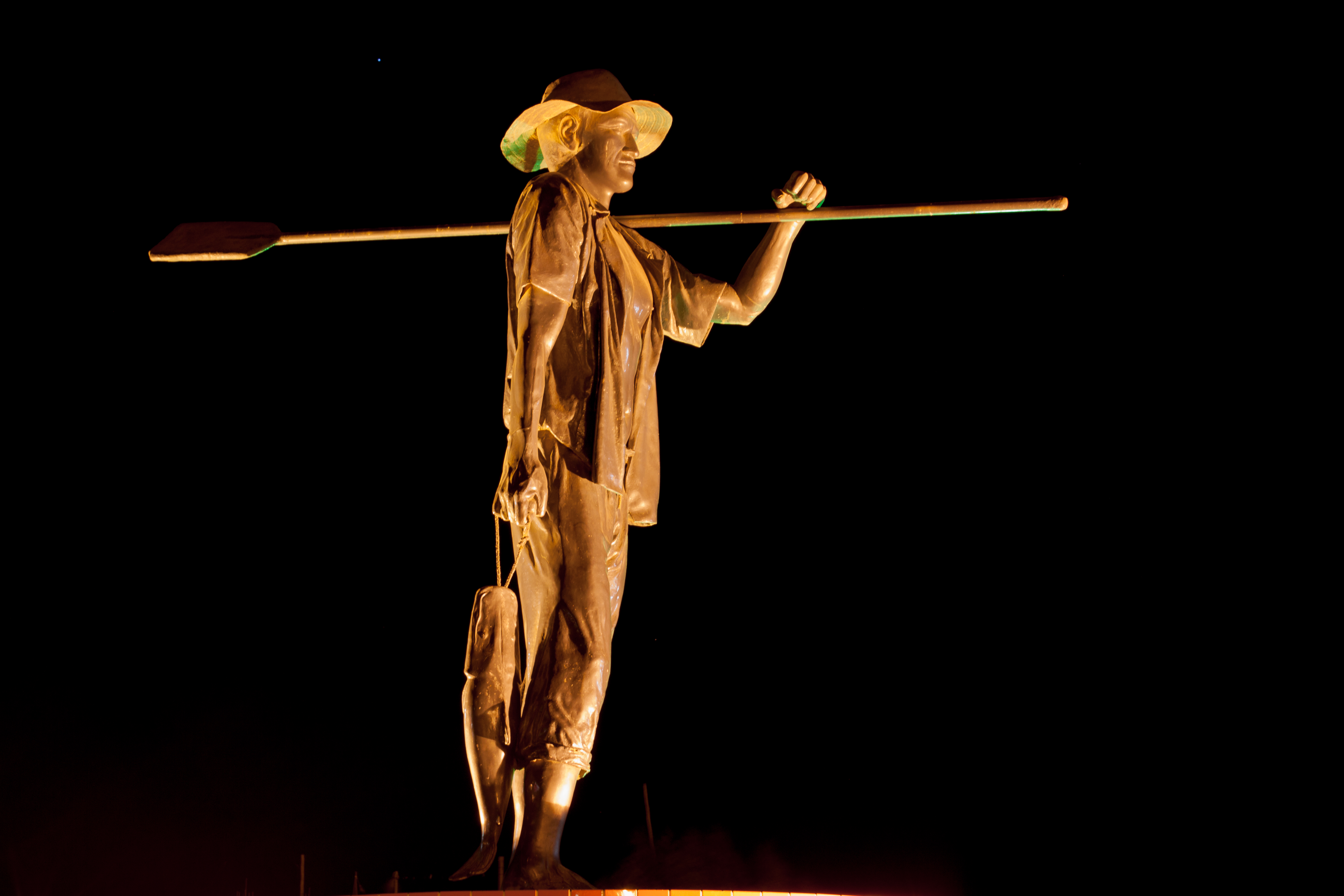 Homenagem aos pescadores do rio São Francisco, Xique-Xique - Bahia